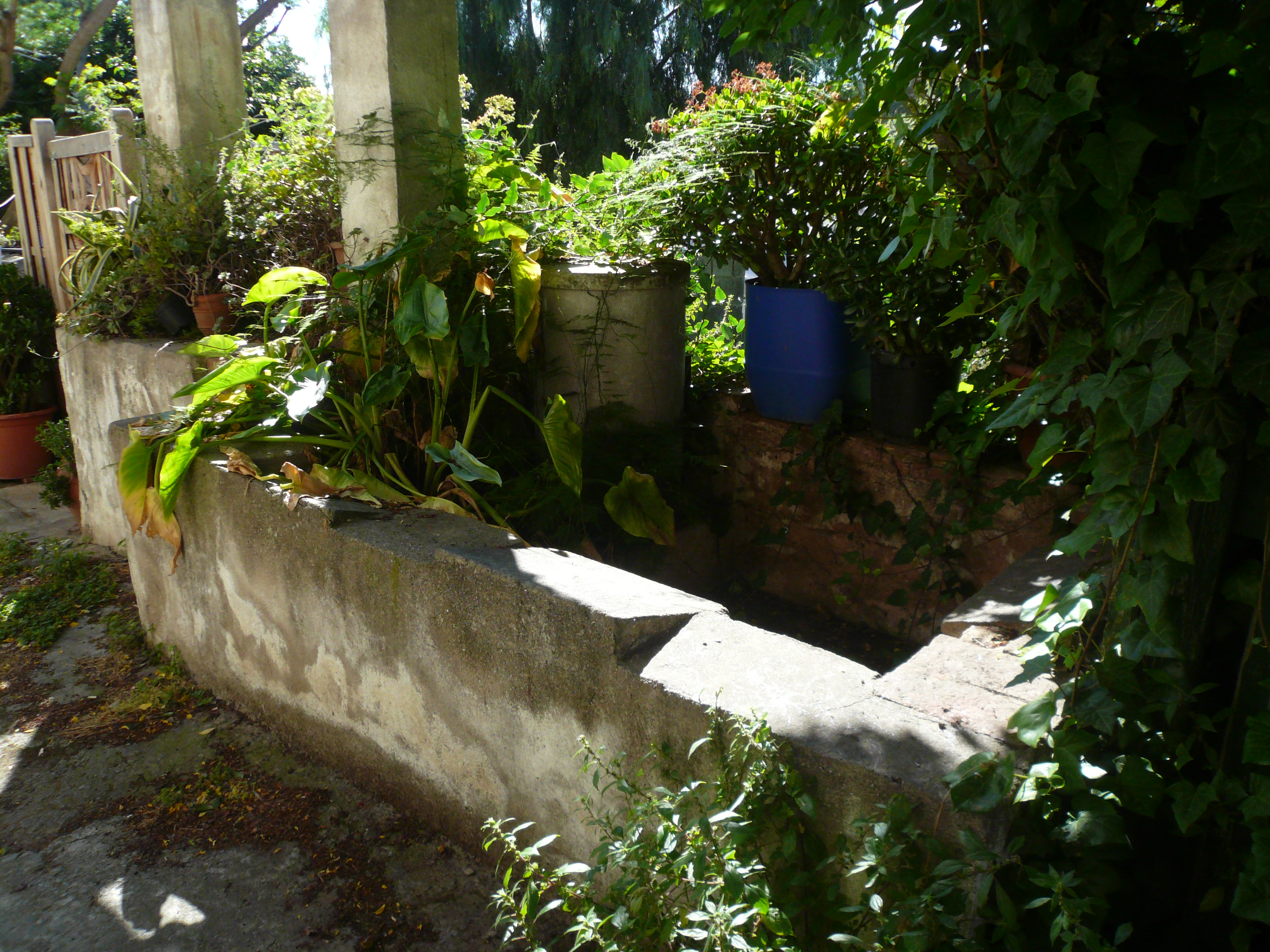 Els Barris de Bugaderes d'Horta. C. Aiguafreda, c. Granollers (Barcelona). Object location41° 25′ 37.6″ N, 2° 09′ 38″ E